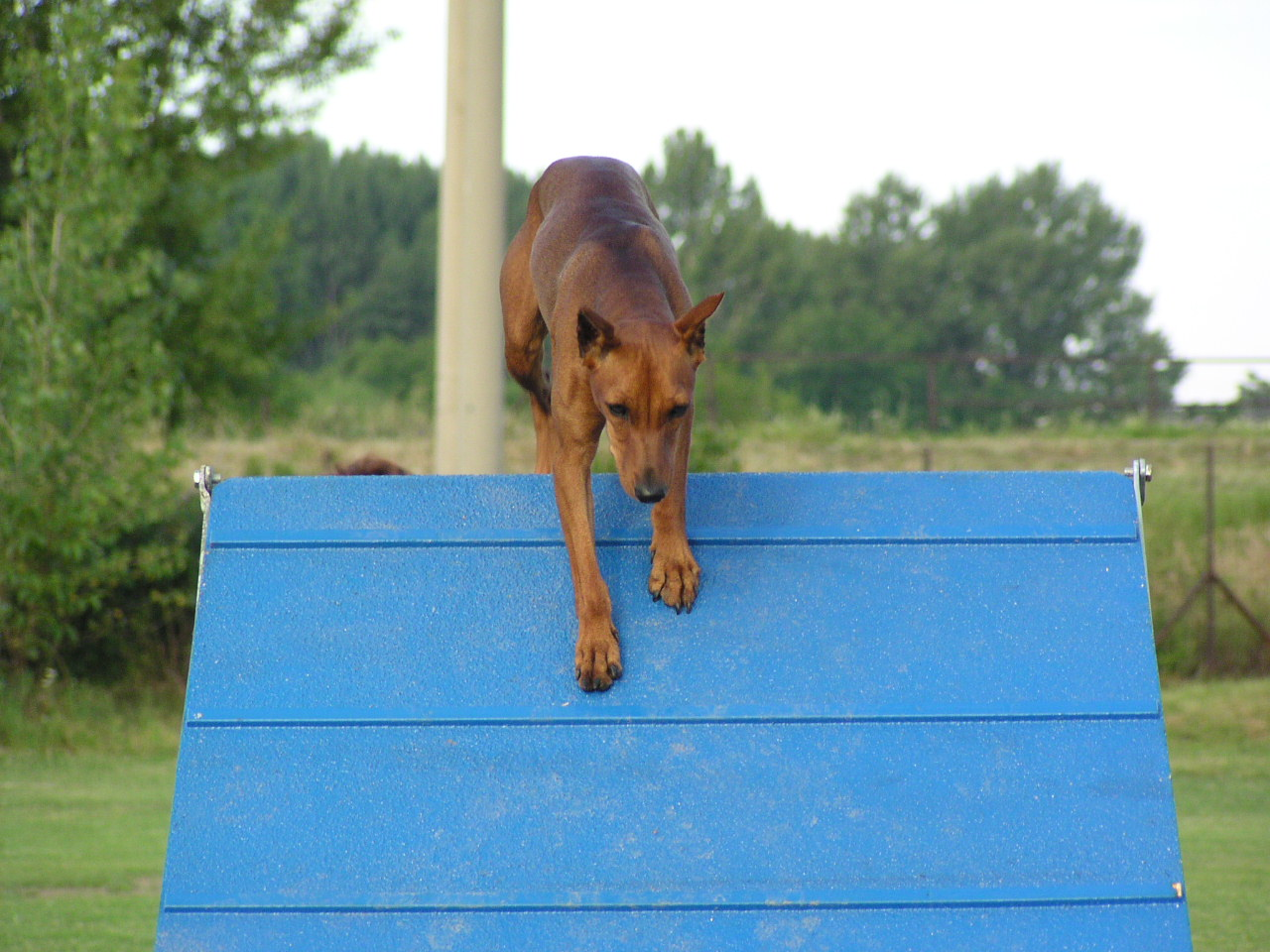 Deutscher Pinscher Fia Fidoria